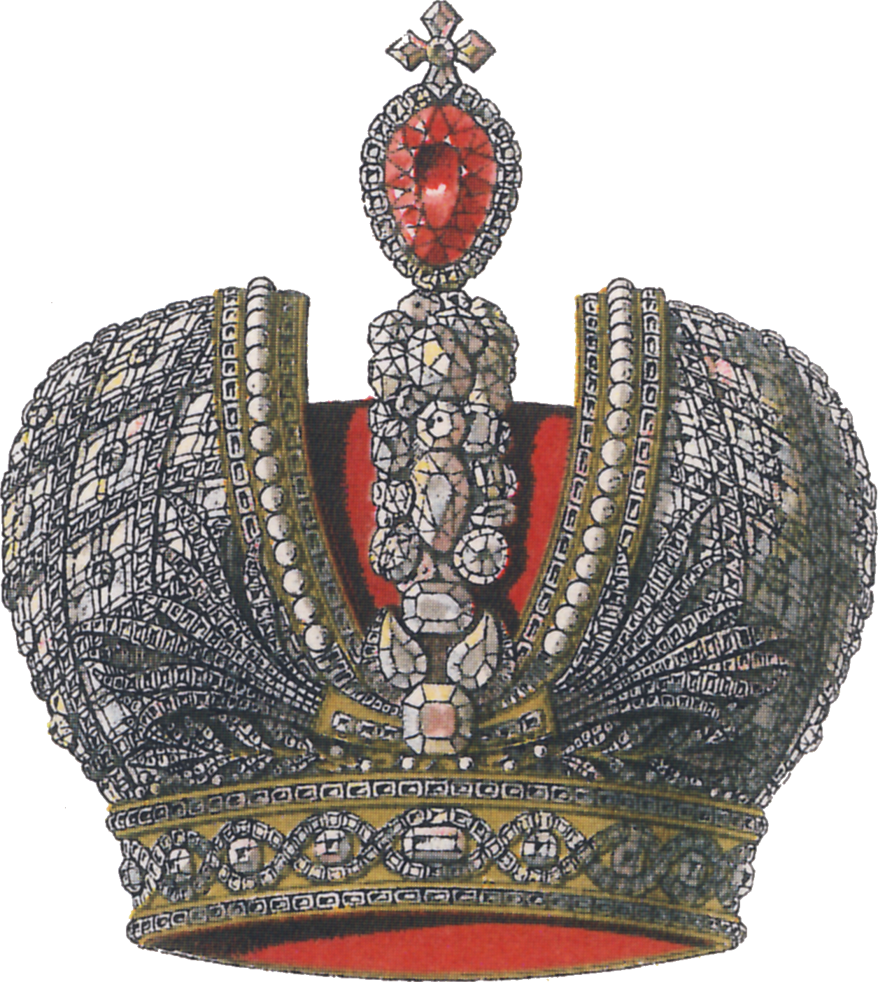 Heraldische Zeichnung der Zarenkrone des Russischen Reiches.